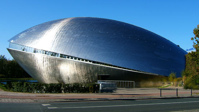 Das Universum Science Center in Bremen. Selbst fotografiert und unter GNU FDL gestellt 2004